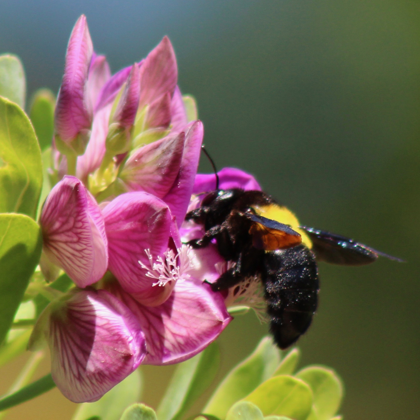 Polygala myrtifolia (Septemberbossie) in Jan Marais-park, Stellenbosch.